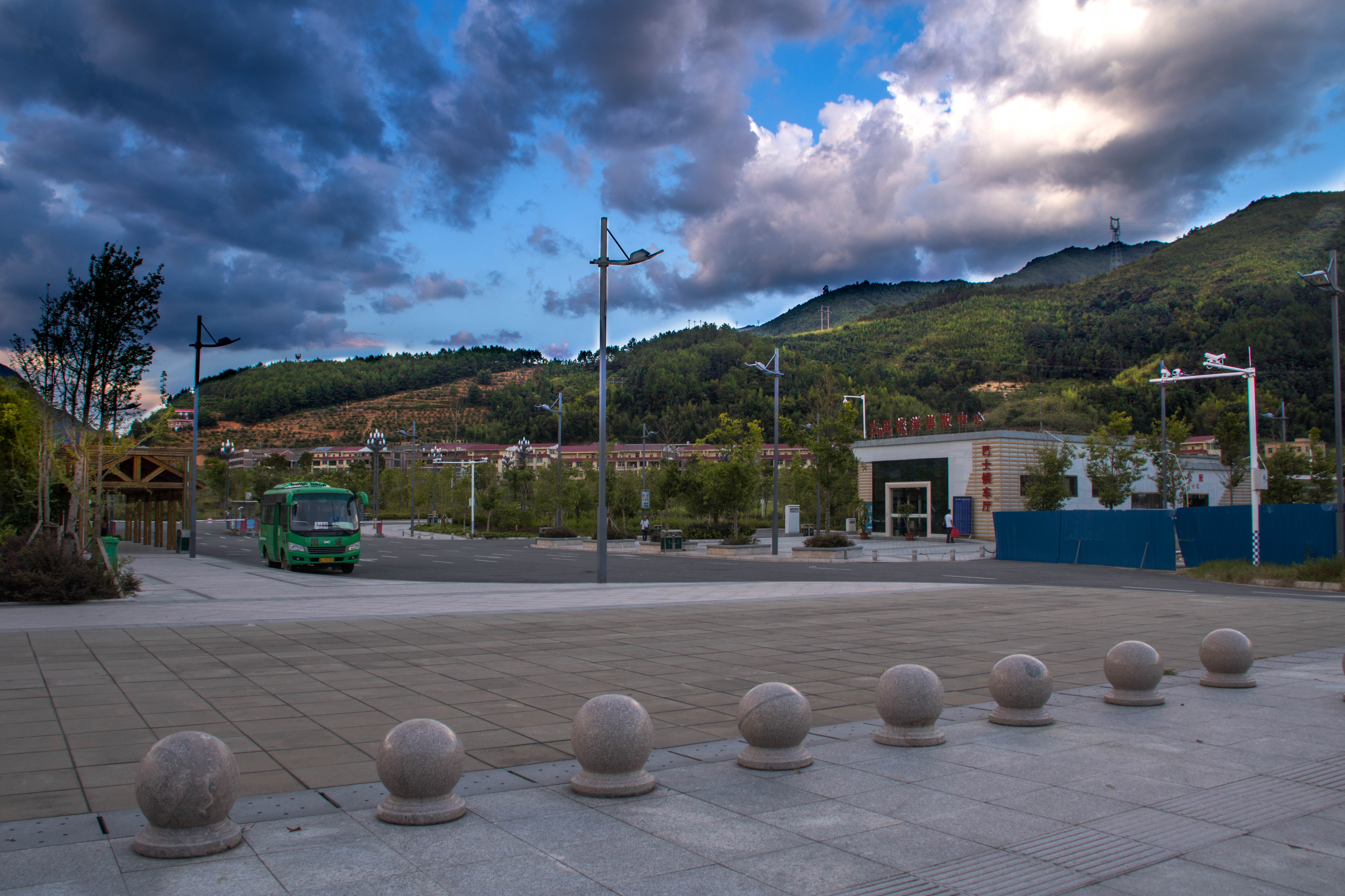 中文（中国大陆）: 古田北站客运站